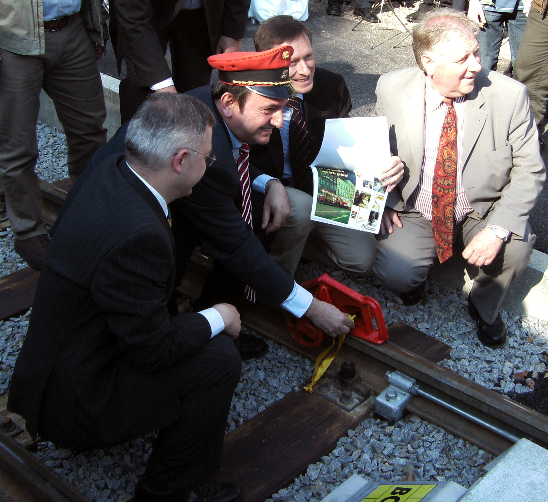 Symbolische Freigabe der neuen Ausweiche, Eröffnungsfest - Haltestelle Tennisplatz